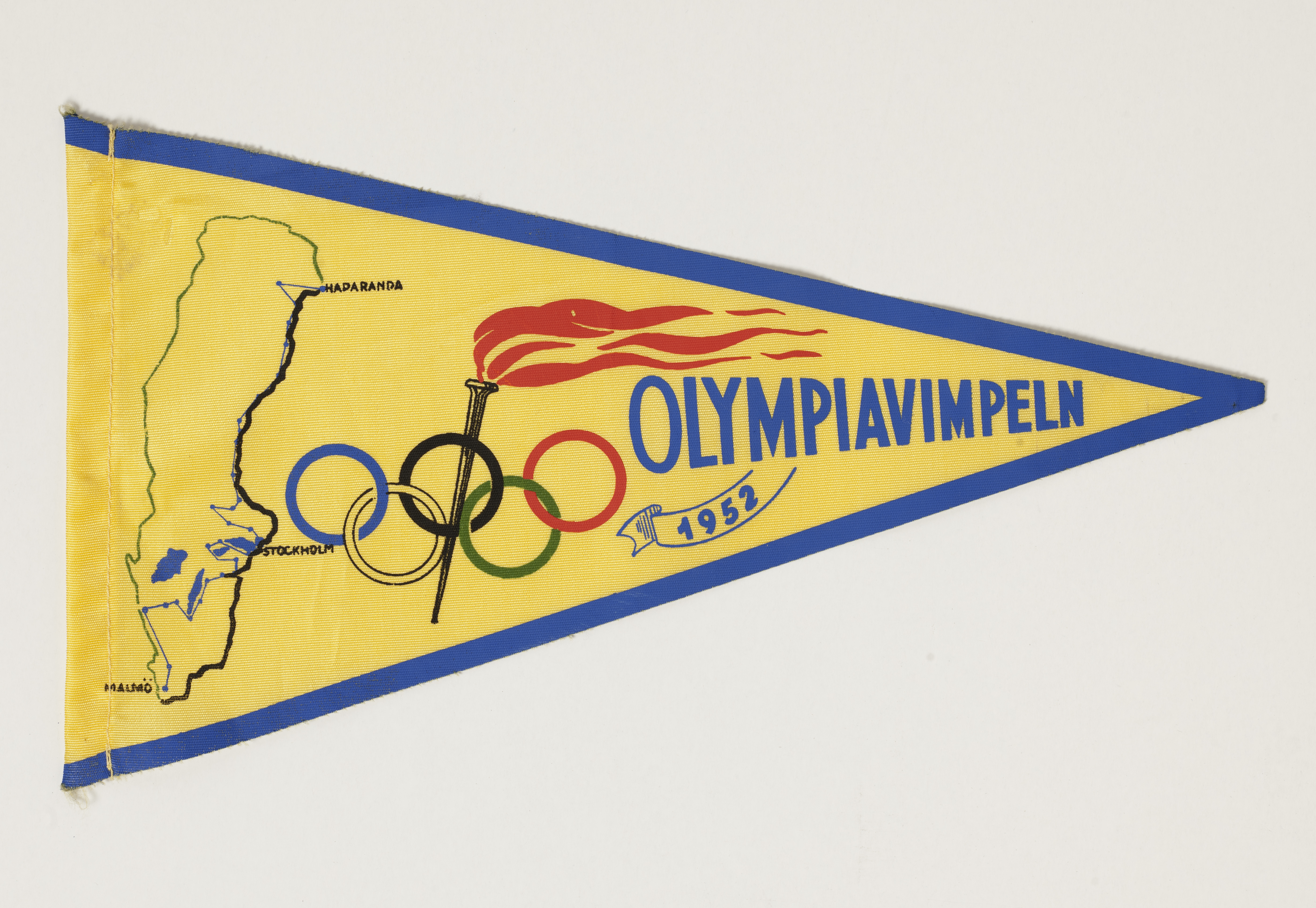 Olympiasoihtuviestiviiri